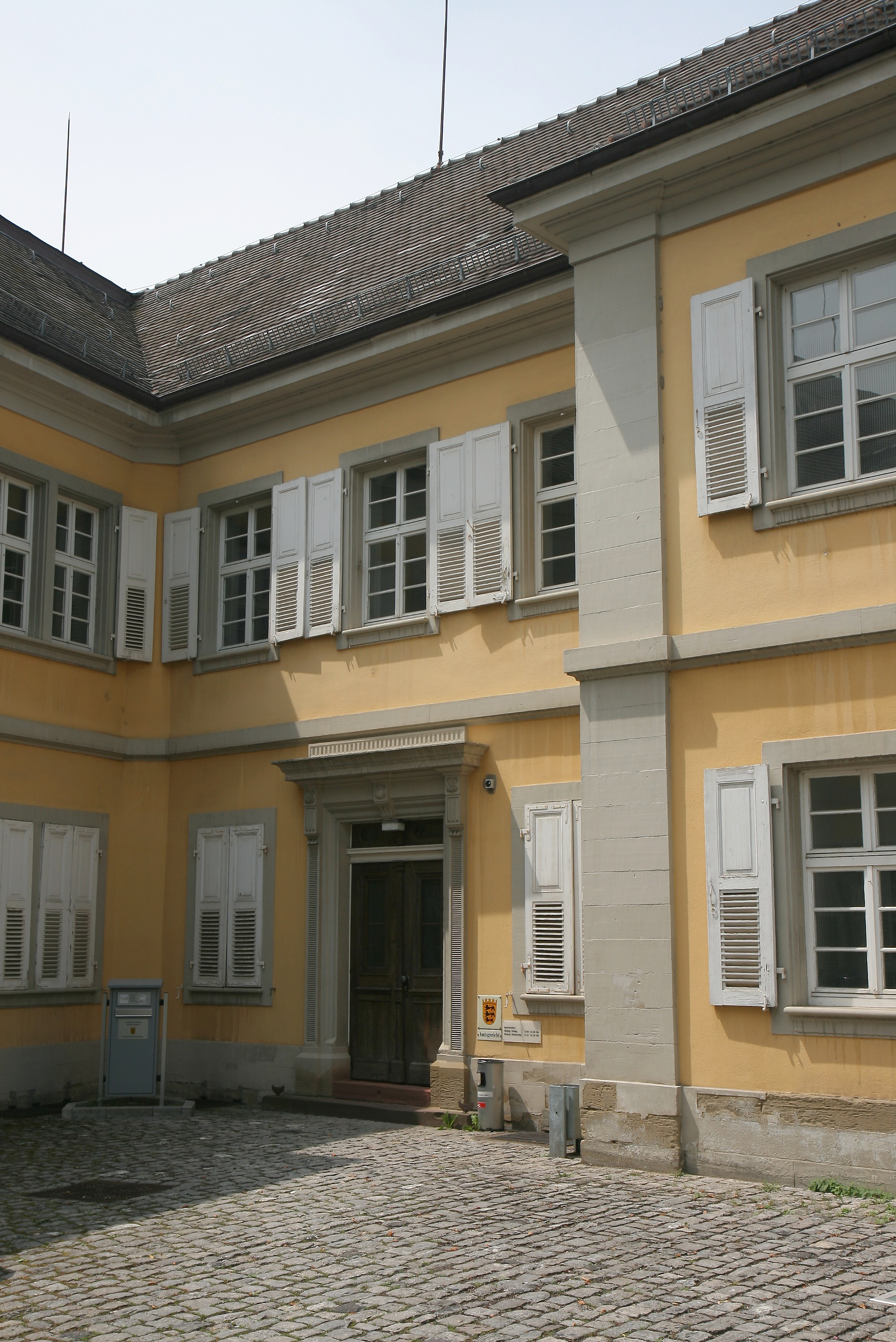 Amtsgericht Bretten im Gebäude des ehemaligen Amtshauses, Obere Kirchgasse 9/Ecke Steingasse in Bretten.